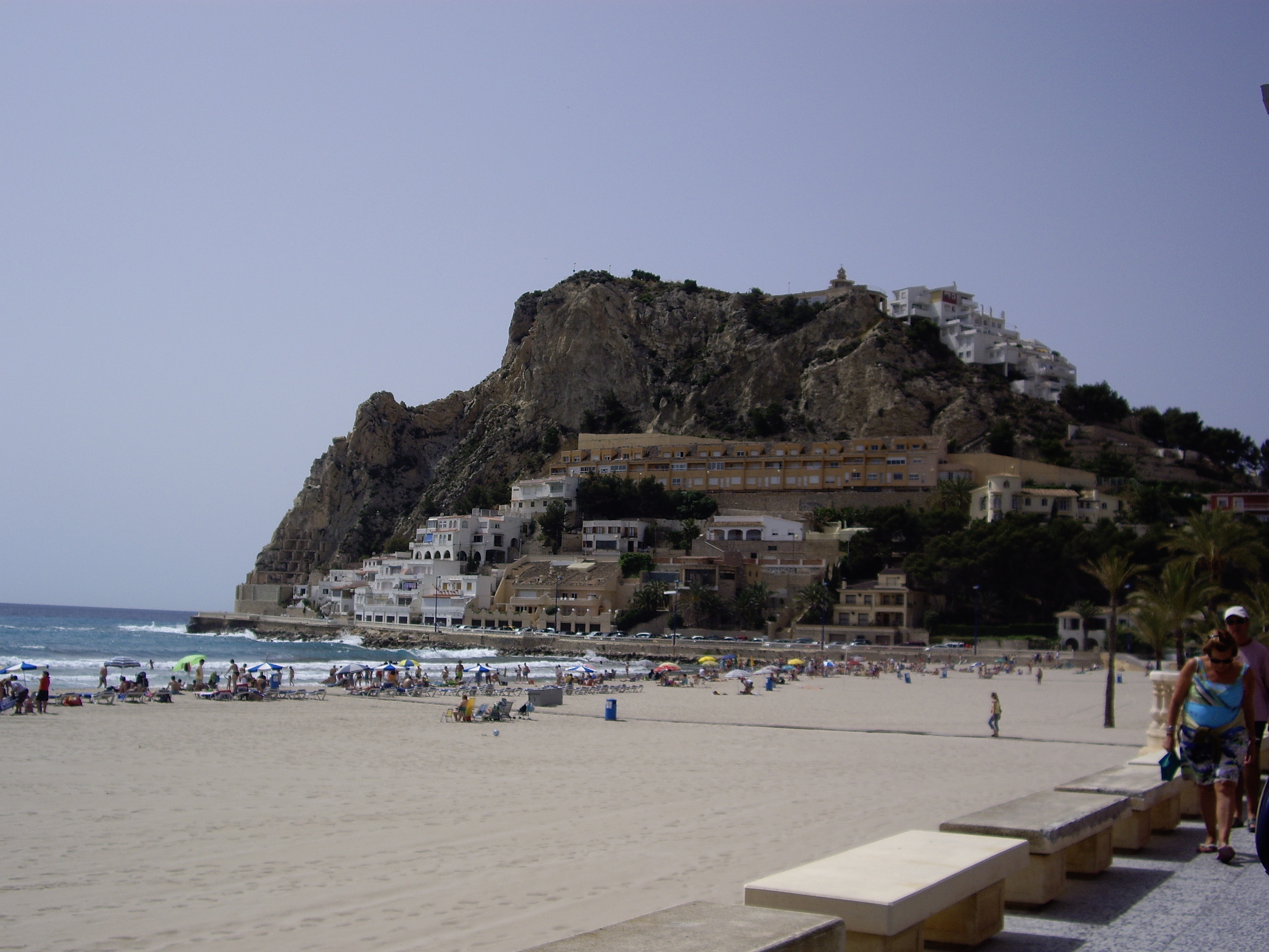 Tossal de la Cala visto desde la playa de la Cala de Benidorm